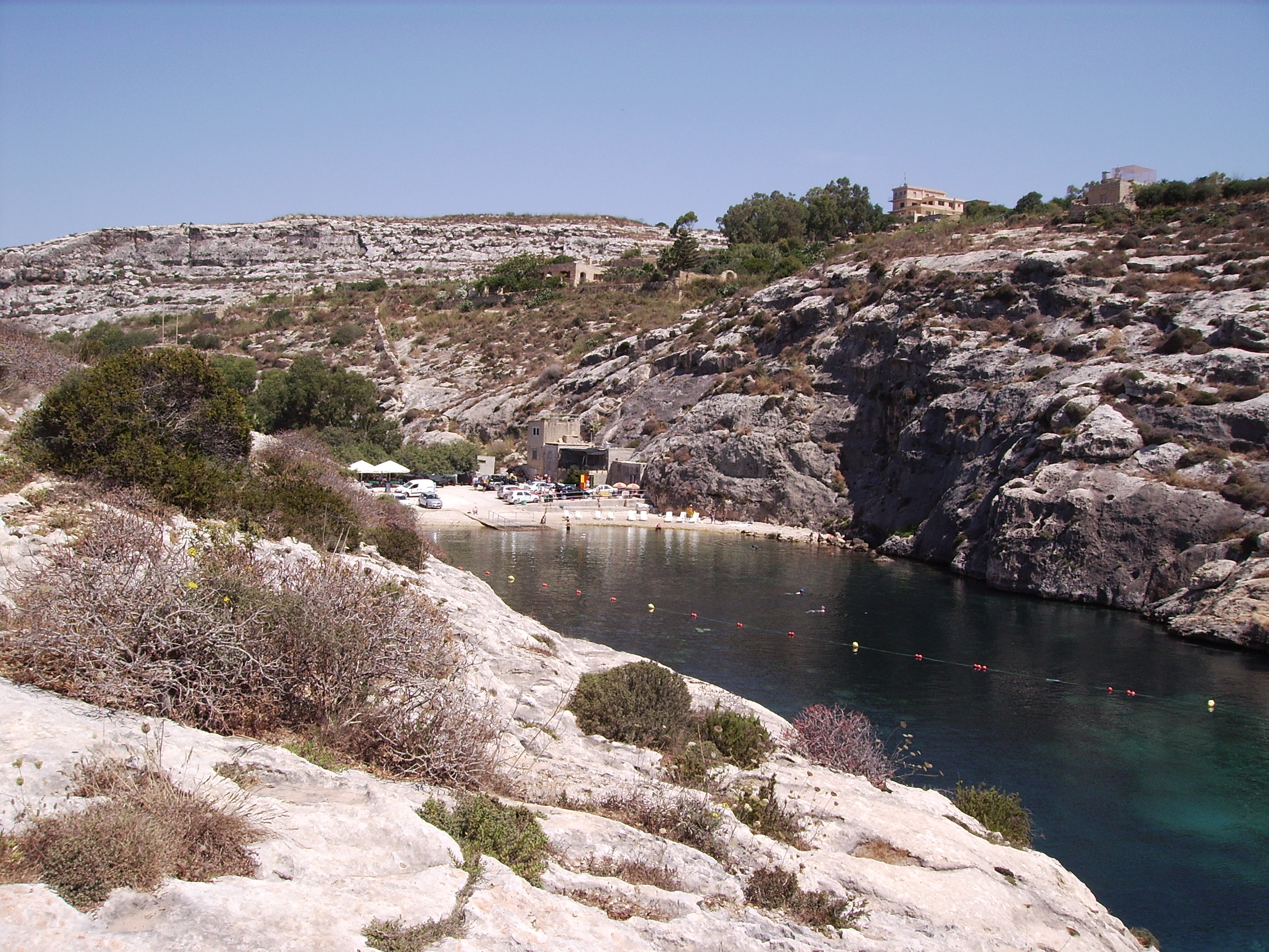 Mgarr iX Xini 1